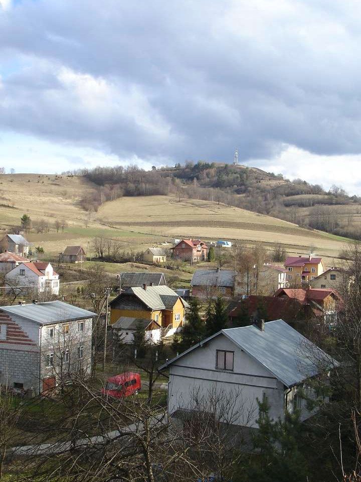 Tarnawa Dolna – wieś w Polsce położona w województwie podkarpackim, w powiecie sanockim, w gminie Zagórz, nad rzeką Osława.